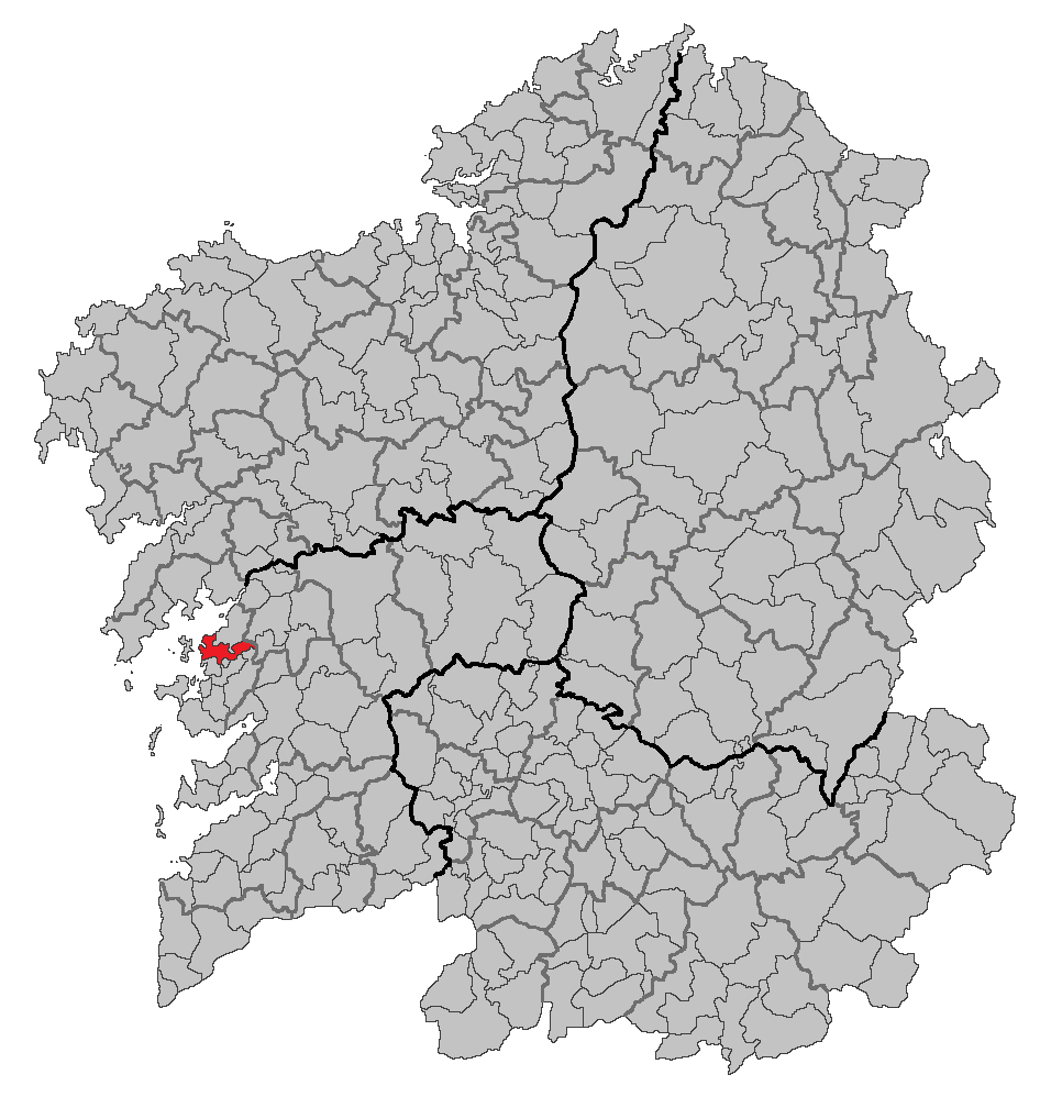 Mapa coa localización do concello de Vilanova de Arousa.